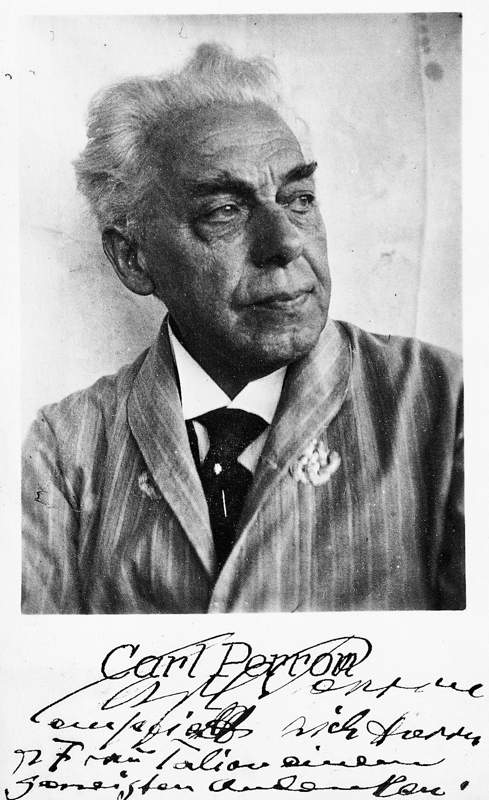 Postkarte zeigt den Bassbariton Karl Perron. Darunter Autogramm des Abgebildeten: "Carl Perron empfiehlt sich Herrn und Frau Falian einem geneigten Andenken."